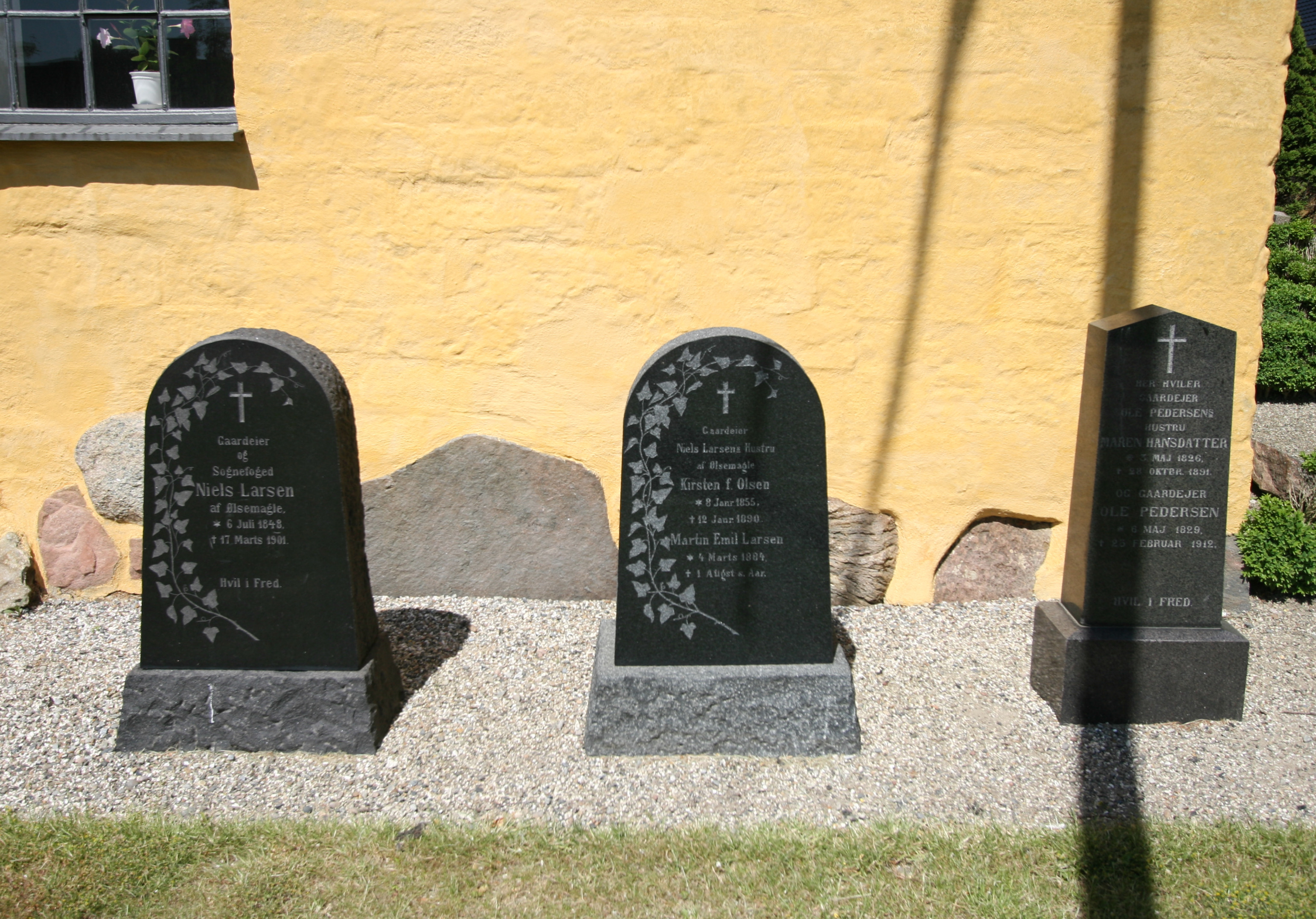 Ølsemagle Kirke, near Køge, Denmark. Gravestones by the quire.